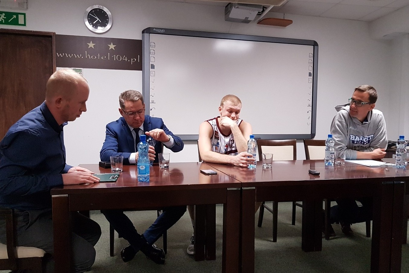 Stargard, 06.12.2017. Pomeczowa konferencja prasowa